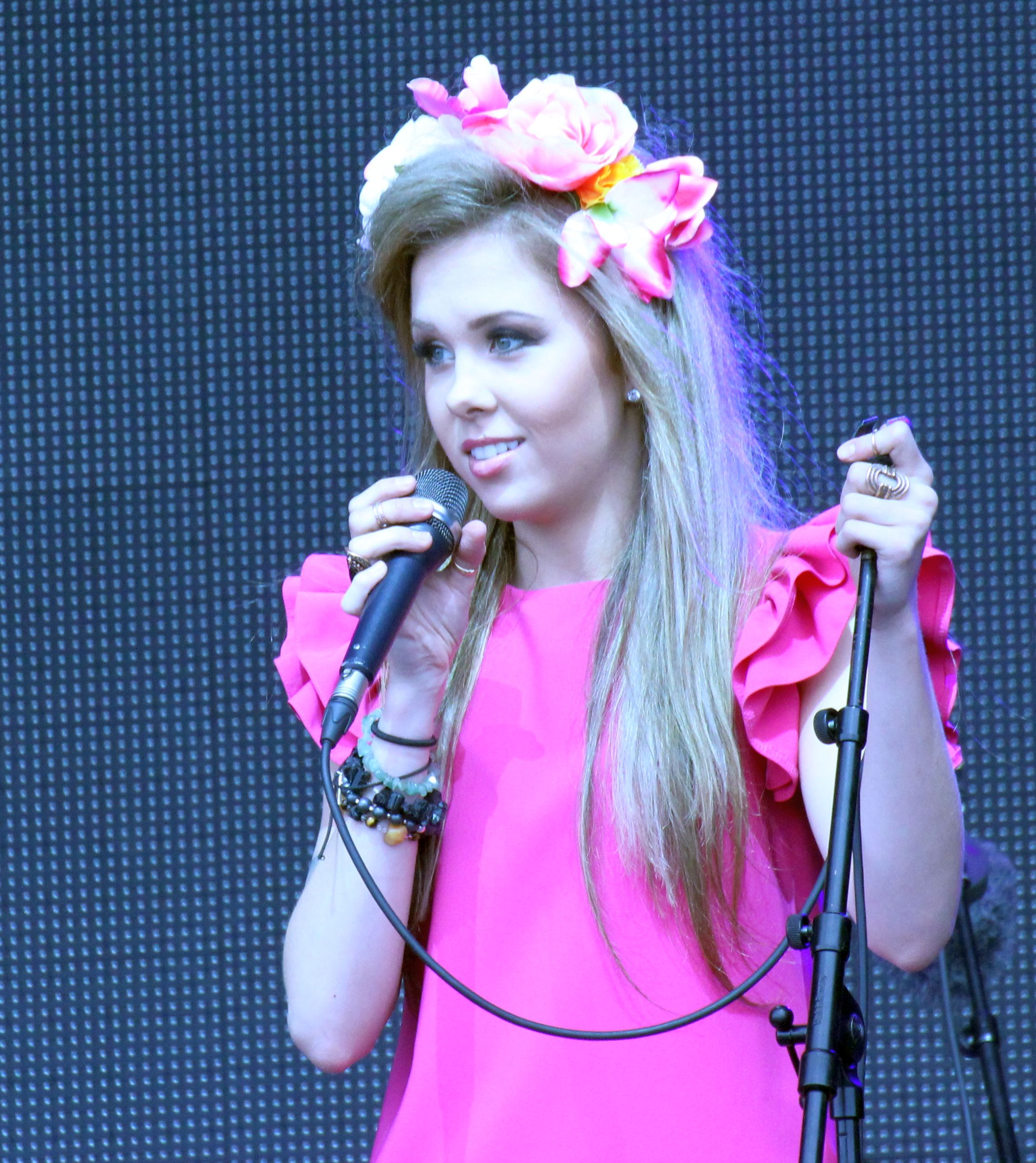 Grete Paia esinemas Tallinna Merepäevadel